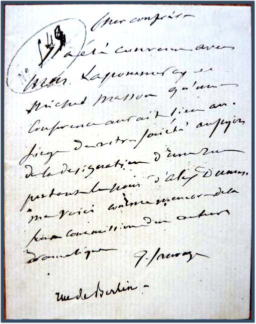 Письмо учредителям конфернции о присвоениии имени Александра Дюма одной из улиц Парижа. 1872